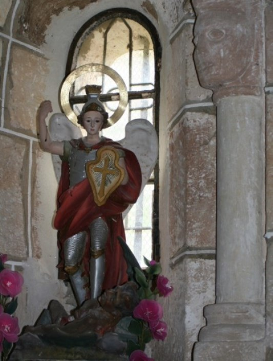 Comitente